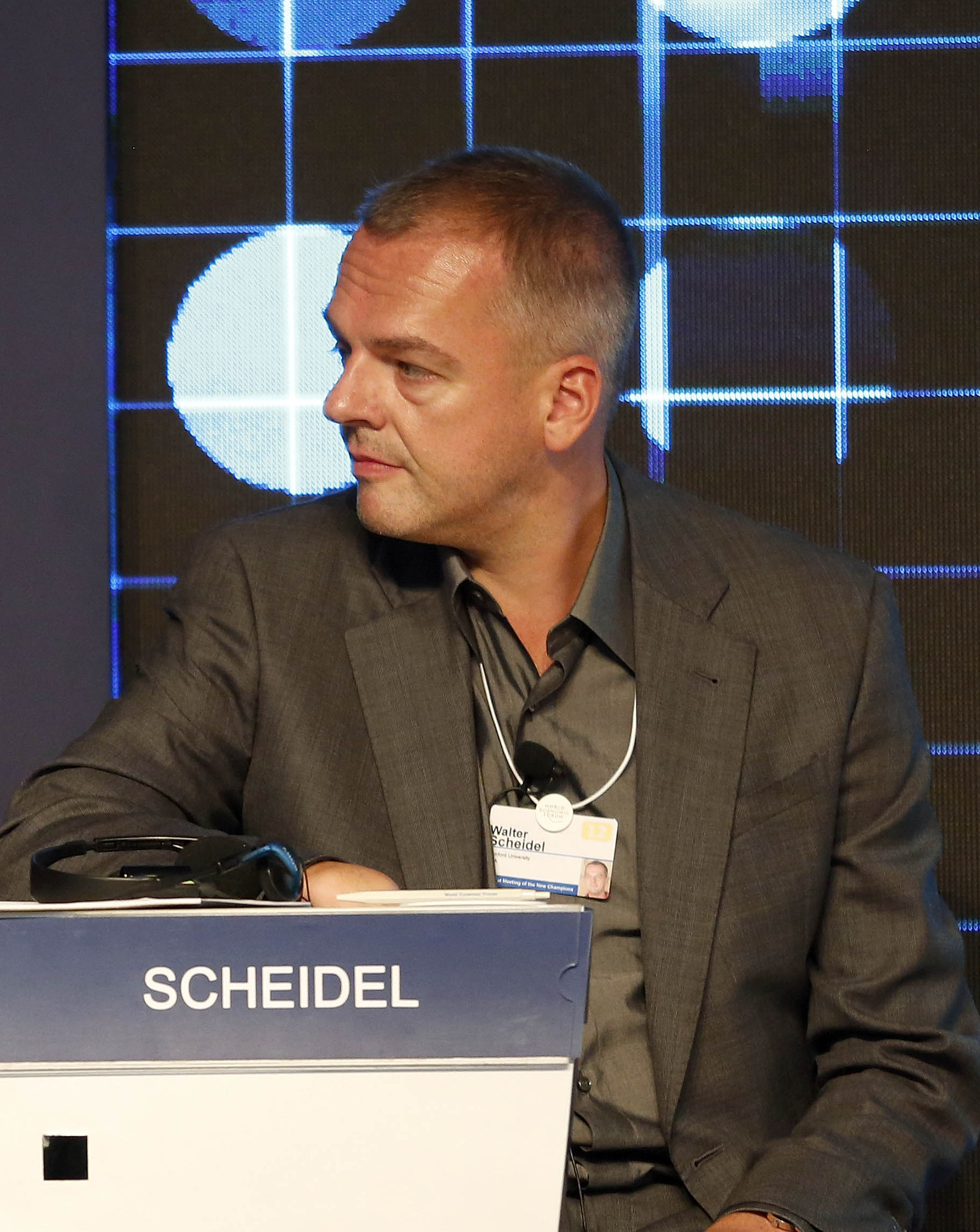 Golan Levin (l) and Walter Scheidel (r)